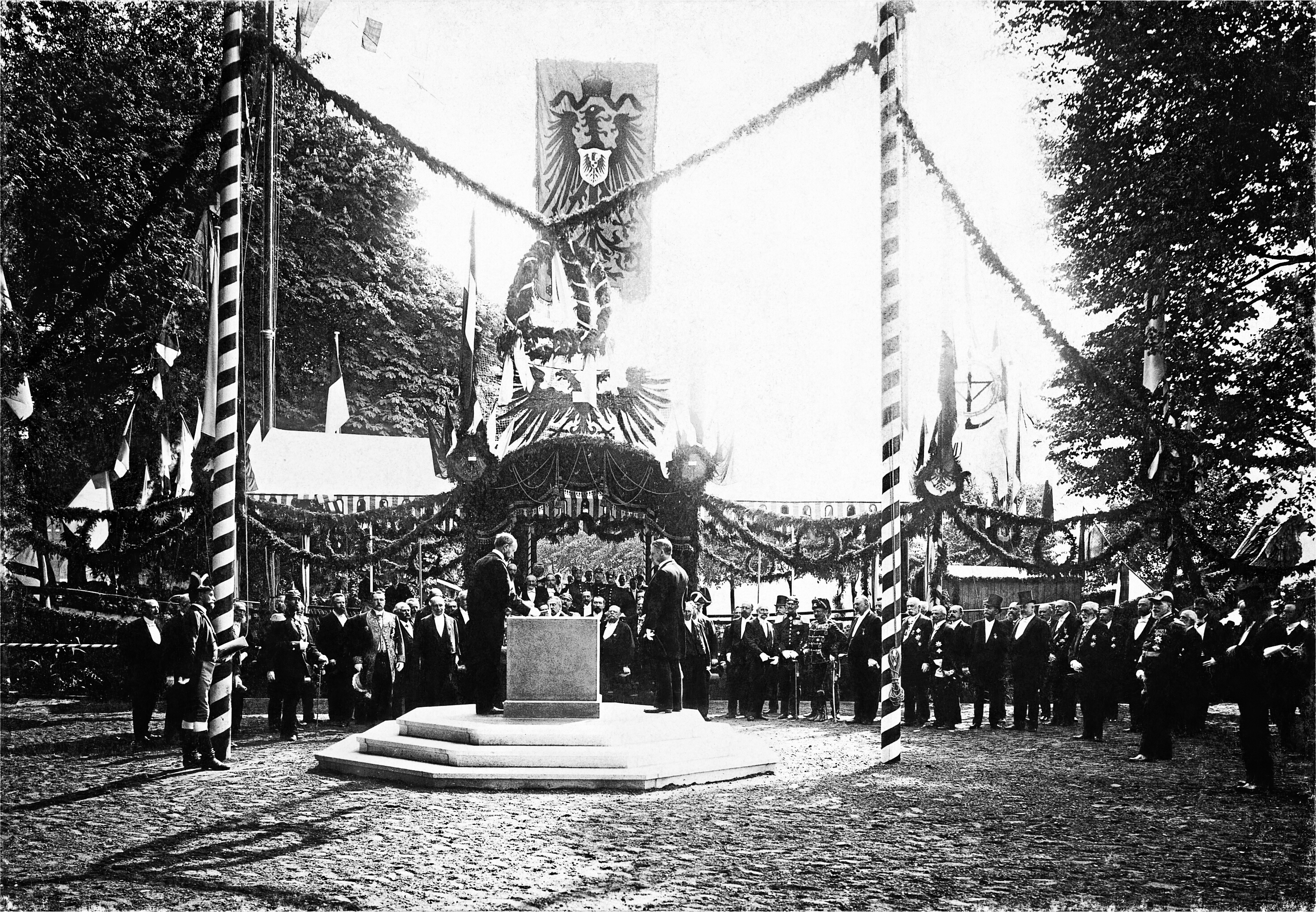 Bildet er hentet fra Nasjonalbibliotekets bildesamling Lübeck, Schleswig-Holstein